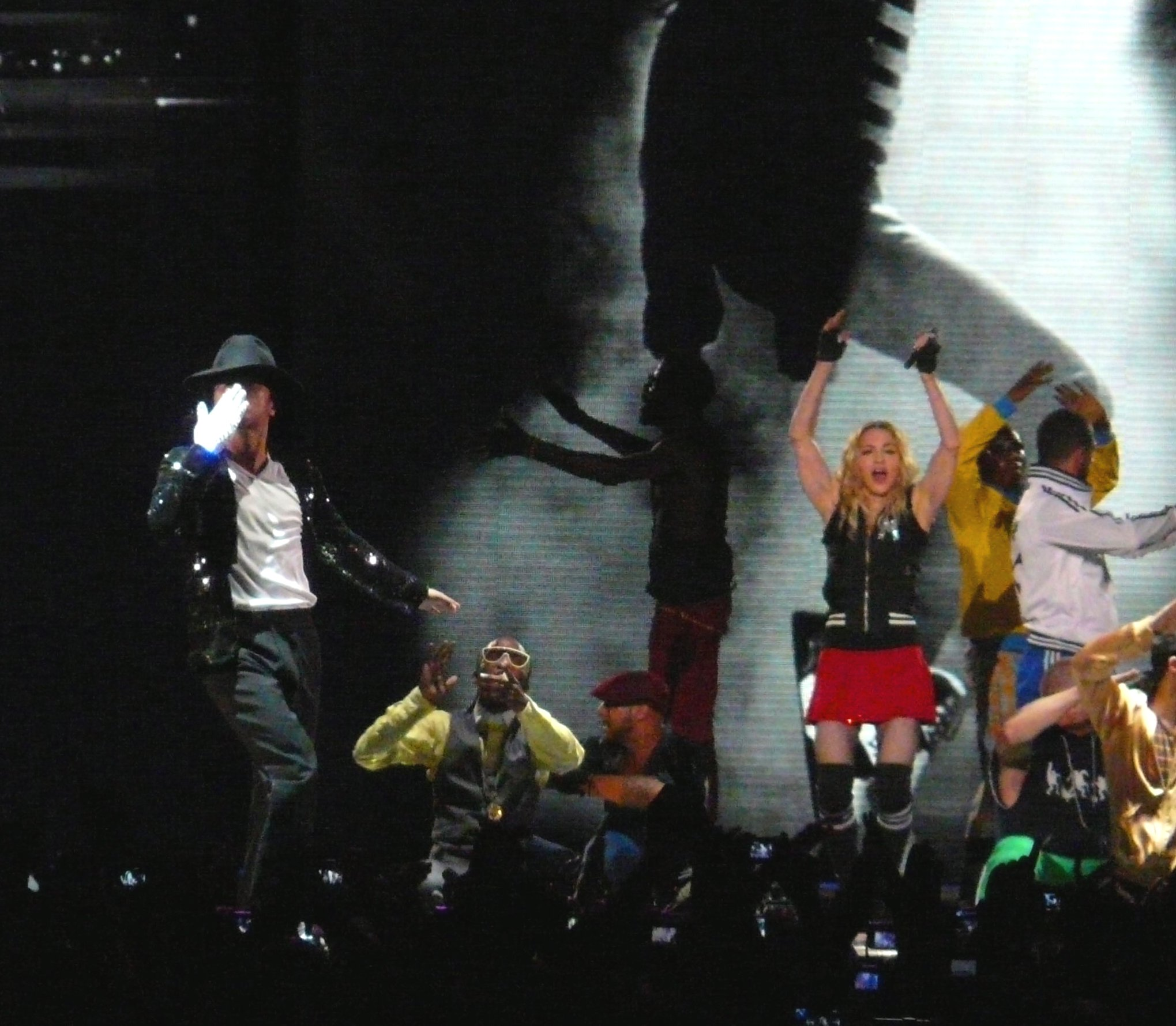 Durante su concierto en el Vicente Calderón. Cantó poco, lució miles de músculos que no parecen humanos, bailó mucho MUY BIEN acompañada, sobró algo de chunda chunda, faltaron clásicos y NO ERAN NECESARIOS los guiños a algo similar a... músicas del mundo, por decir algo.